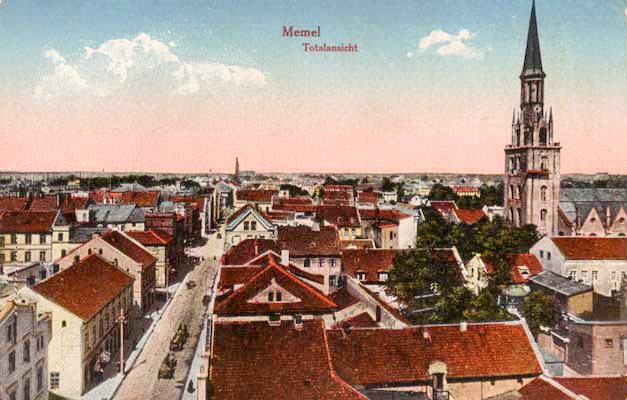 Klaipėda (Memel) city panorama